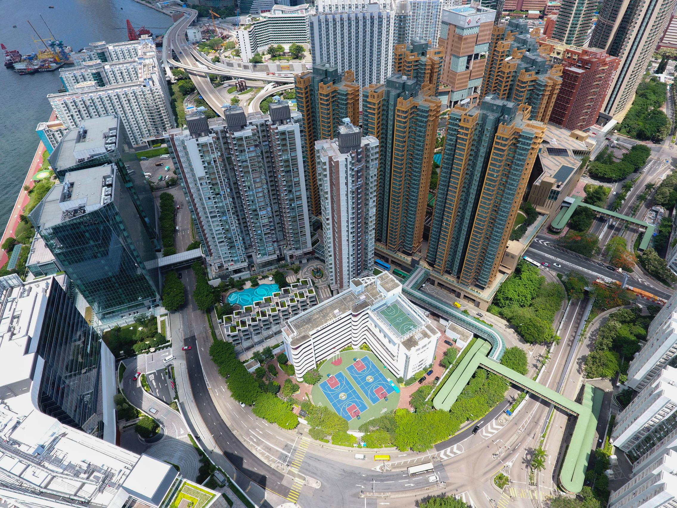 Hung Hom Bay Buildings